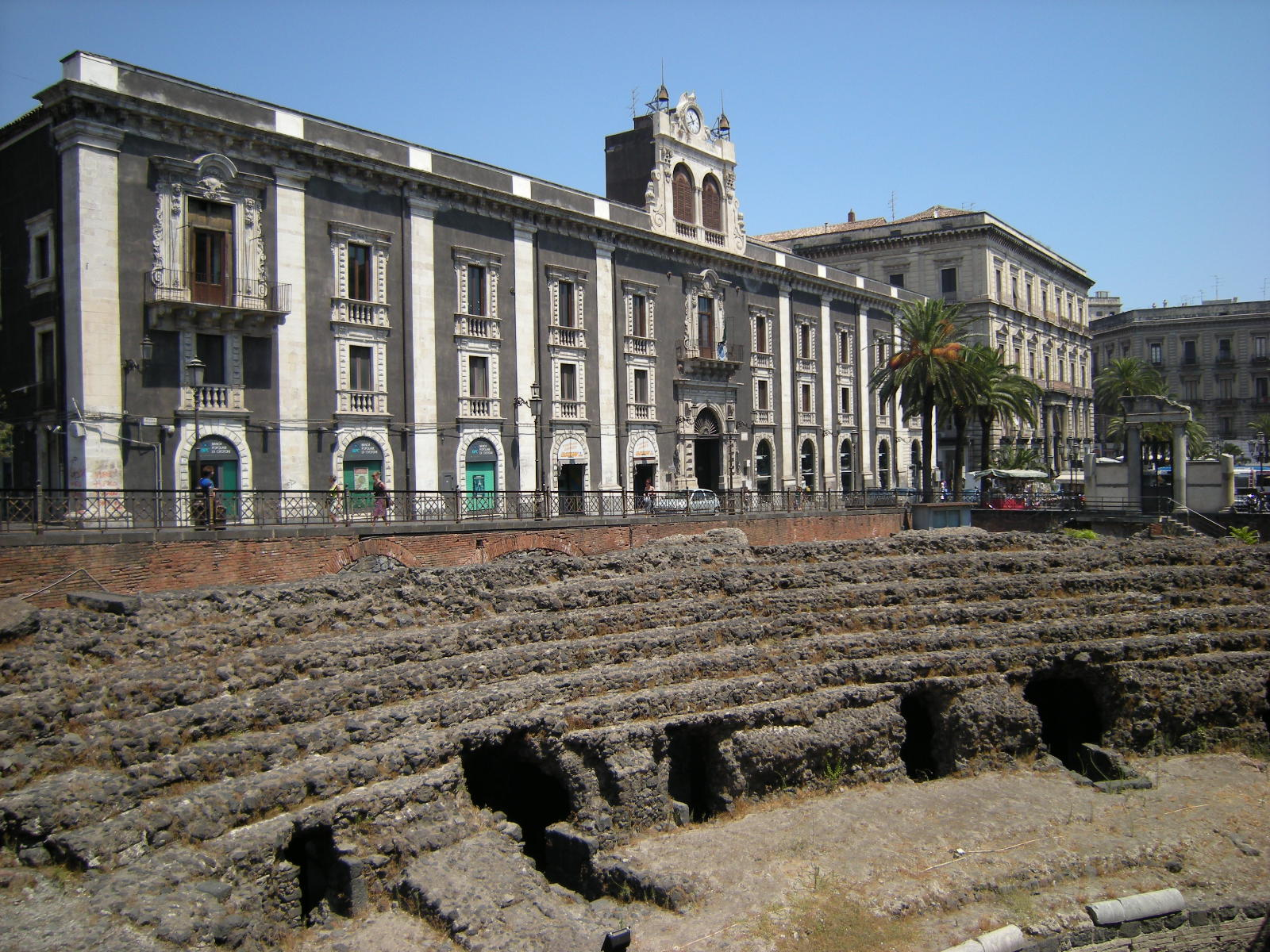 Abaixo, as ruínas do "Coliseu" de Catania. Construido no século II e destruído após um grande terremoto por volta de 1690.